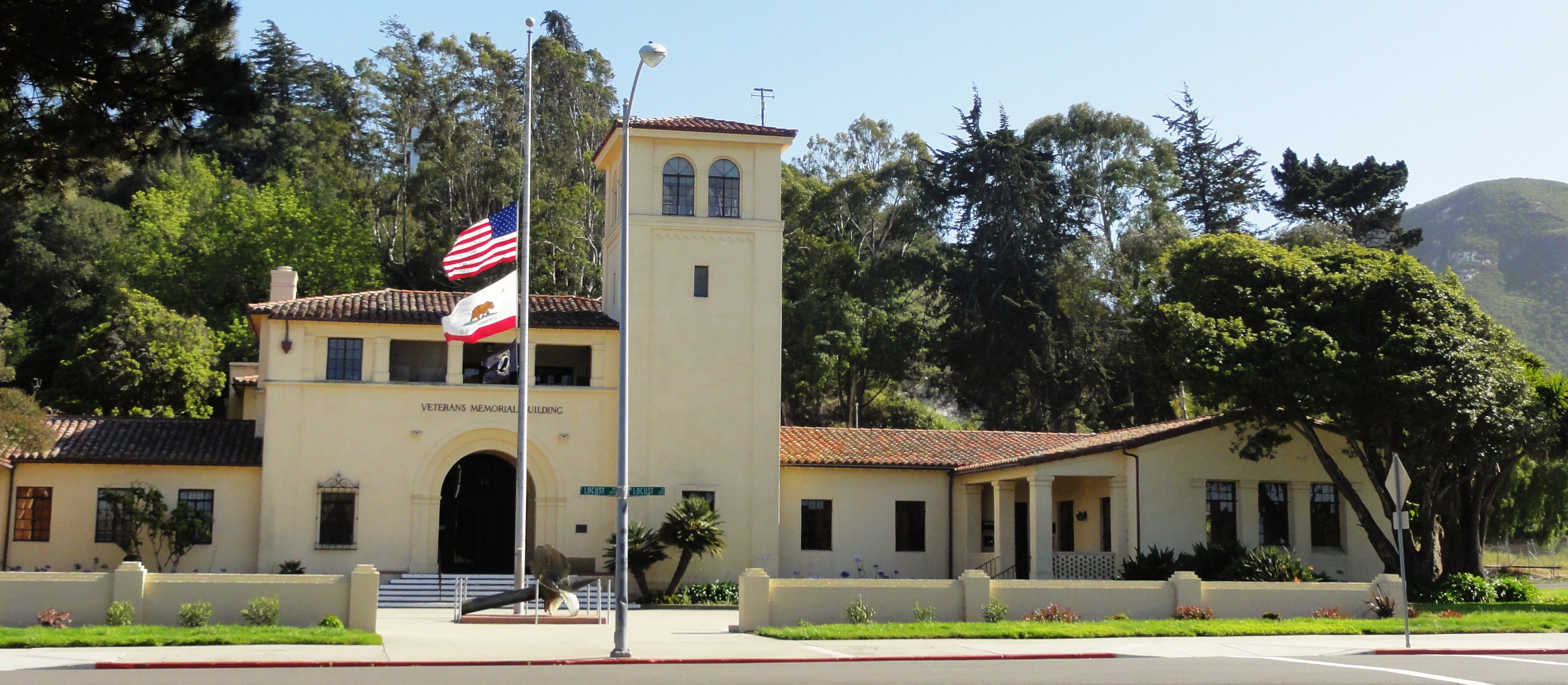 Lompoc